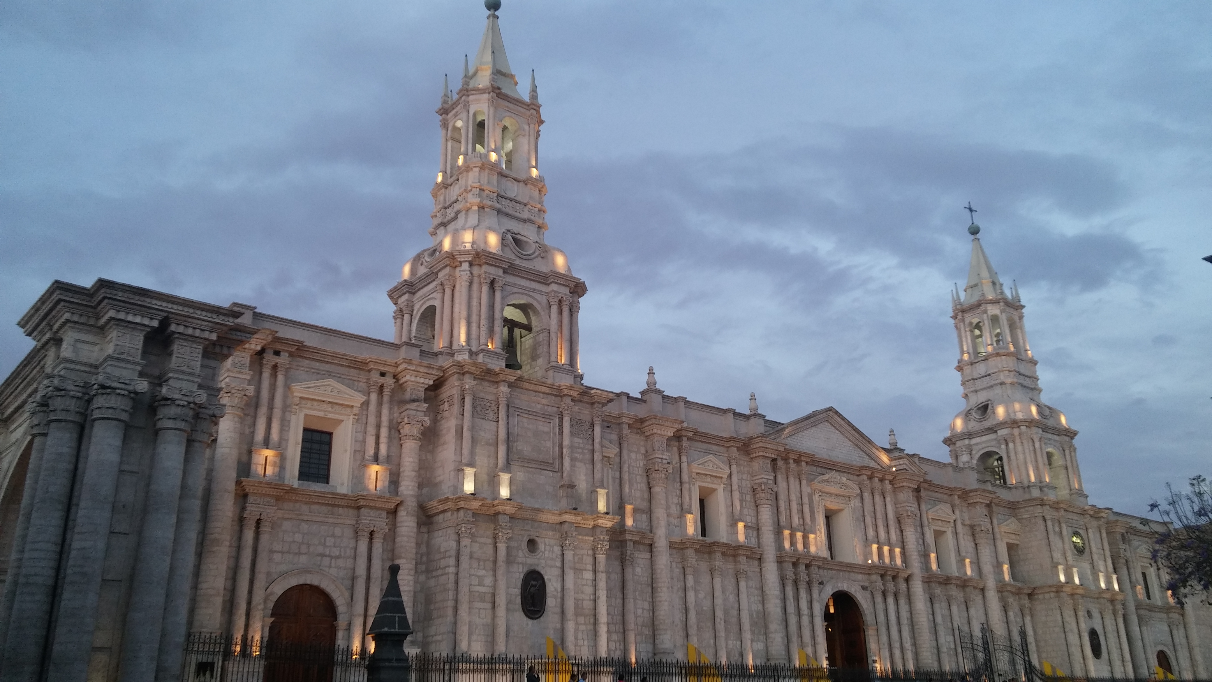 La bellísima Catedral de Areuipa